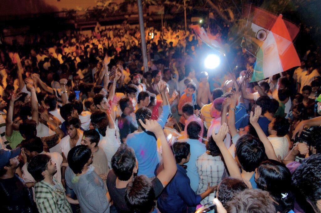 Reunion